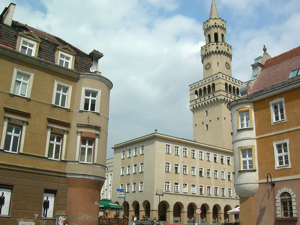 Hôtel de Ville.